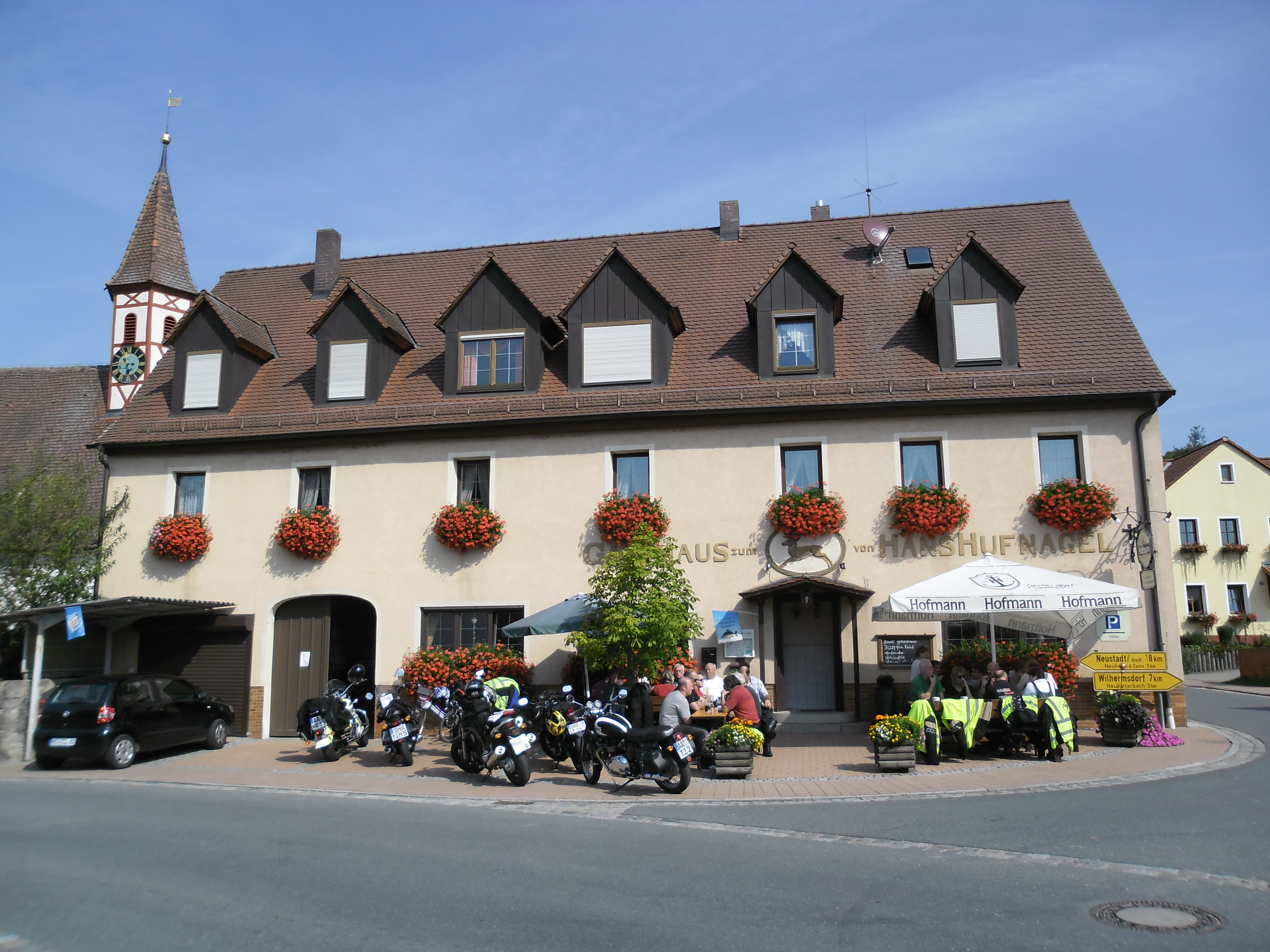 Der Gasthof zum Hirschen im Neuhofer Ortsteil Hirschneuses an der Kreisstraße NEA 10 (Hirschneuses 15)